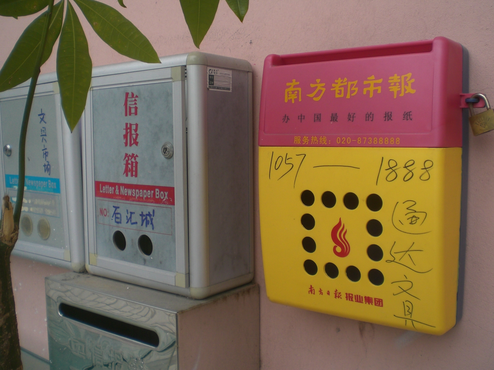 深圳市福田區南方日報報業集團信報箱